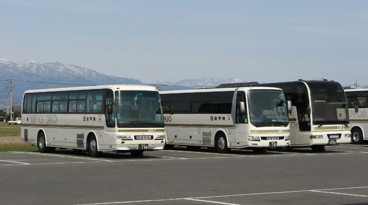 日本中央バスの貸切車両。高速路線車両と違い、車体に大きくnippon chuoのロゴが付されている。日本中央バス前橋営業所敷地外（公道上）より撮影。